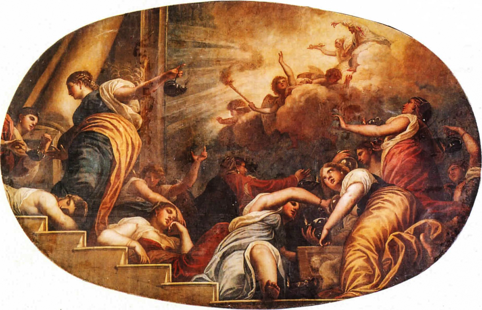 Parabola delle Vergini sagge, dipinto di Alessandro Varotari già nella chiesa degli incurabili